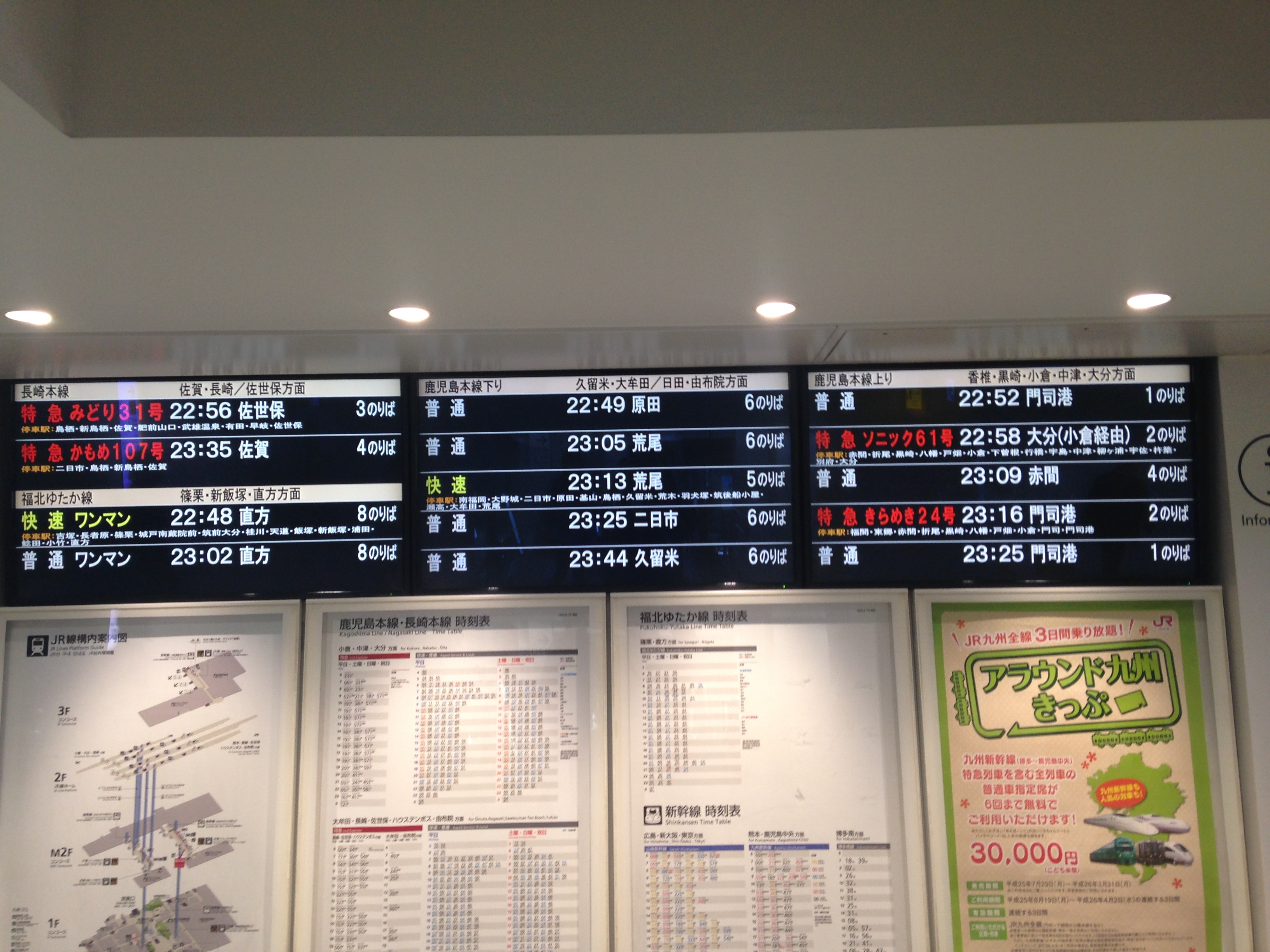 博多駅の電光掲示板